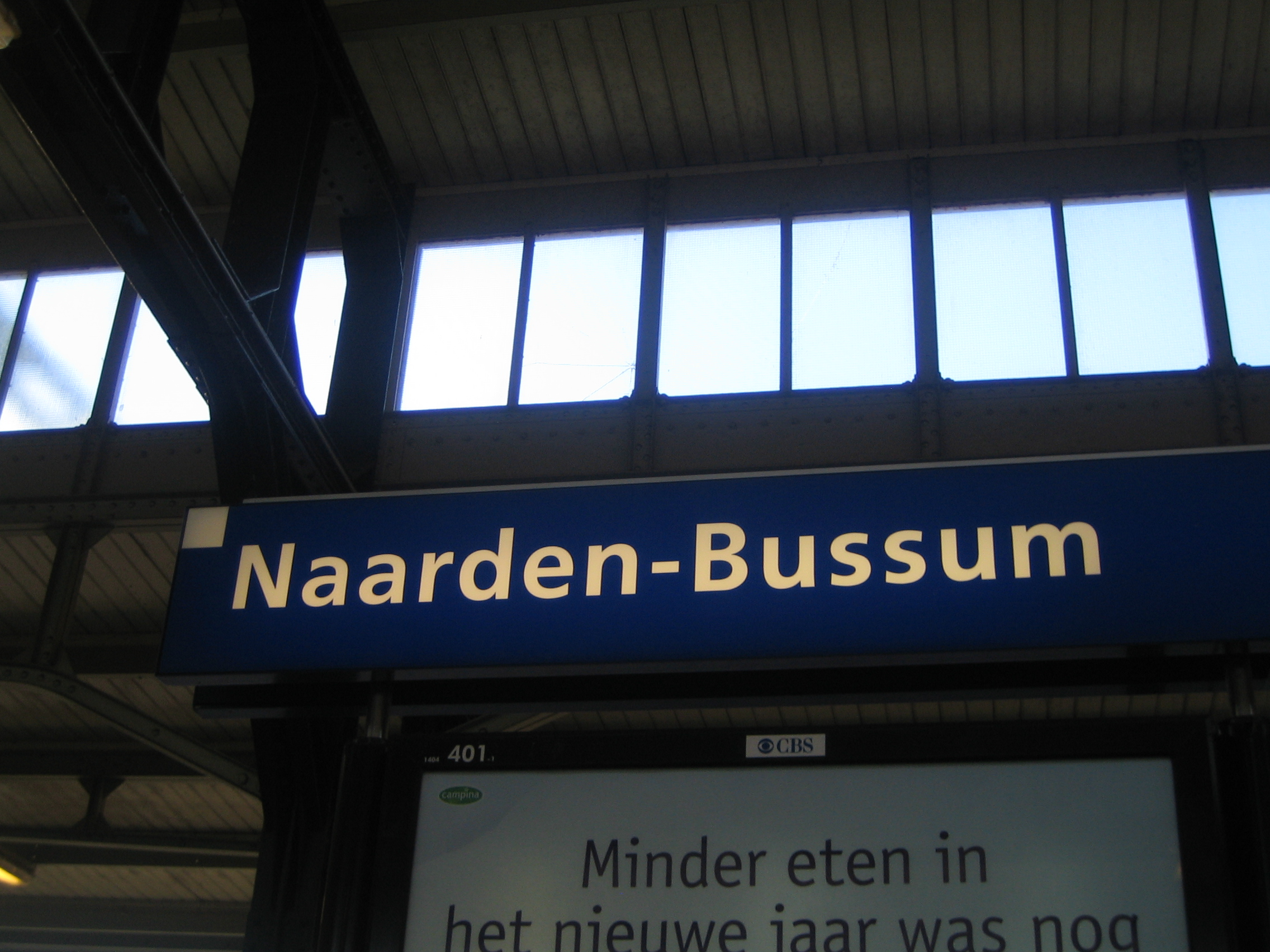 Station Naarden-Bussum bord